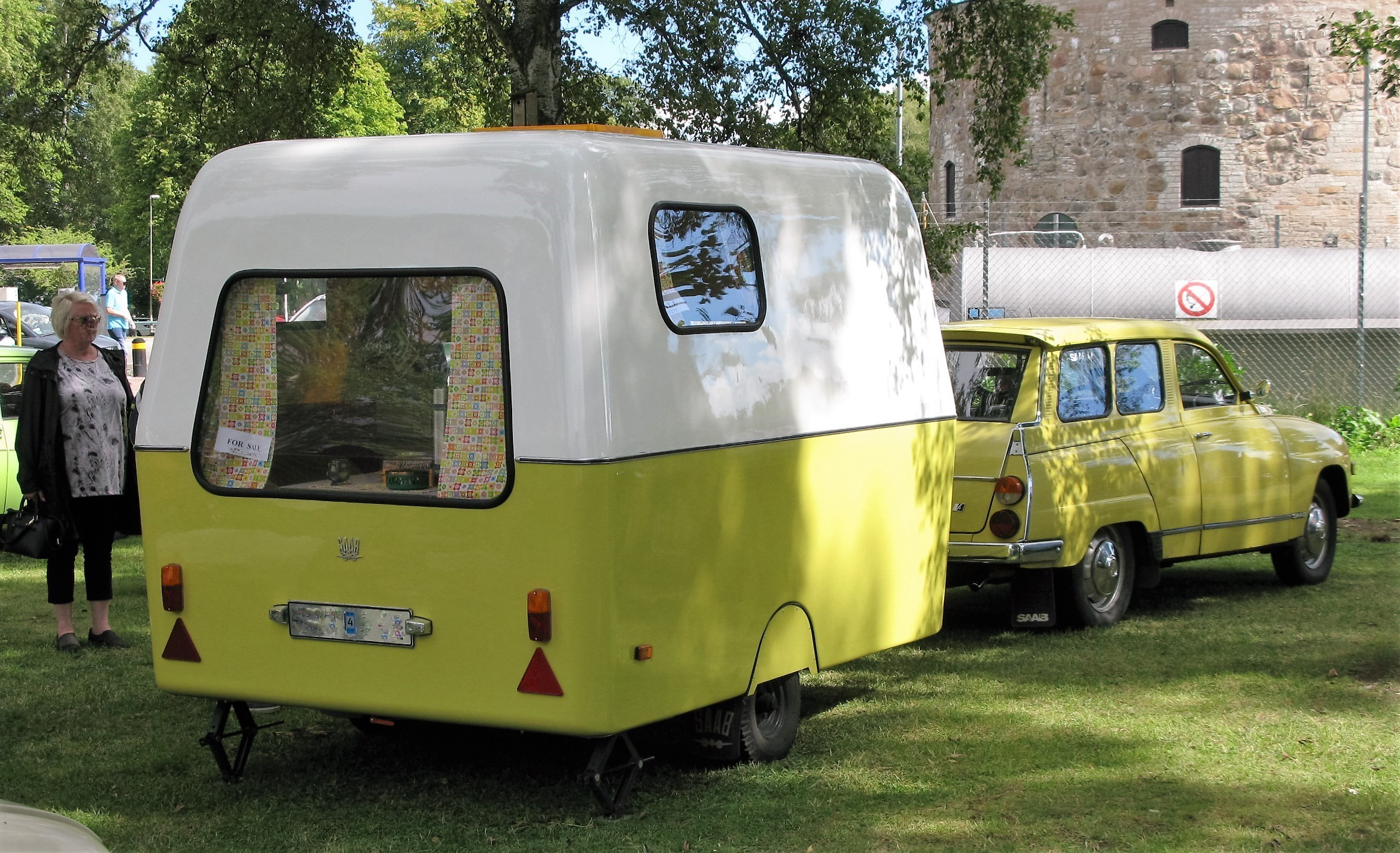 International Saab Meeting 2016.